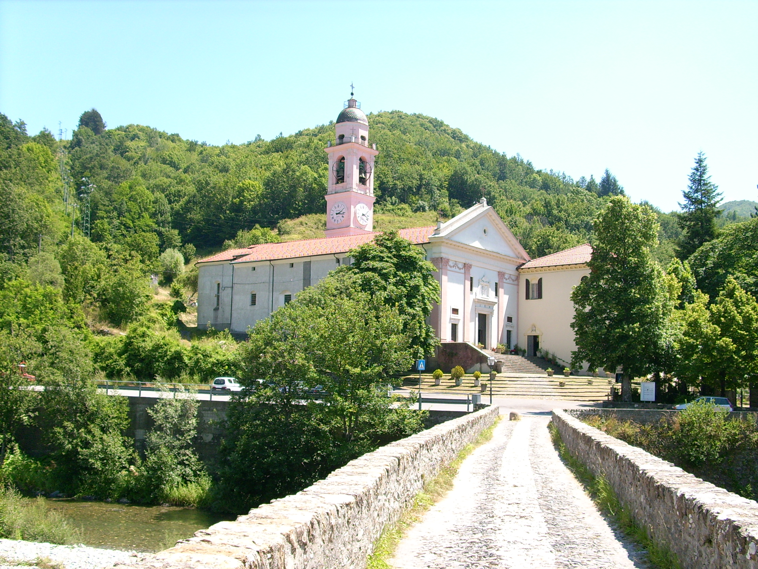 Santuario di Nostra Signora di Montebruno, Liguria, Italia